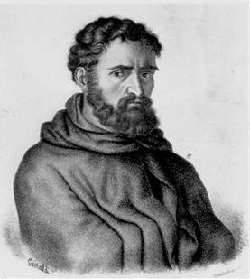 Fra Dolcino, litografia autore: Michele Doyen (1809 - 1881) sec. XIX fonte